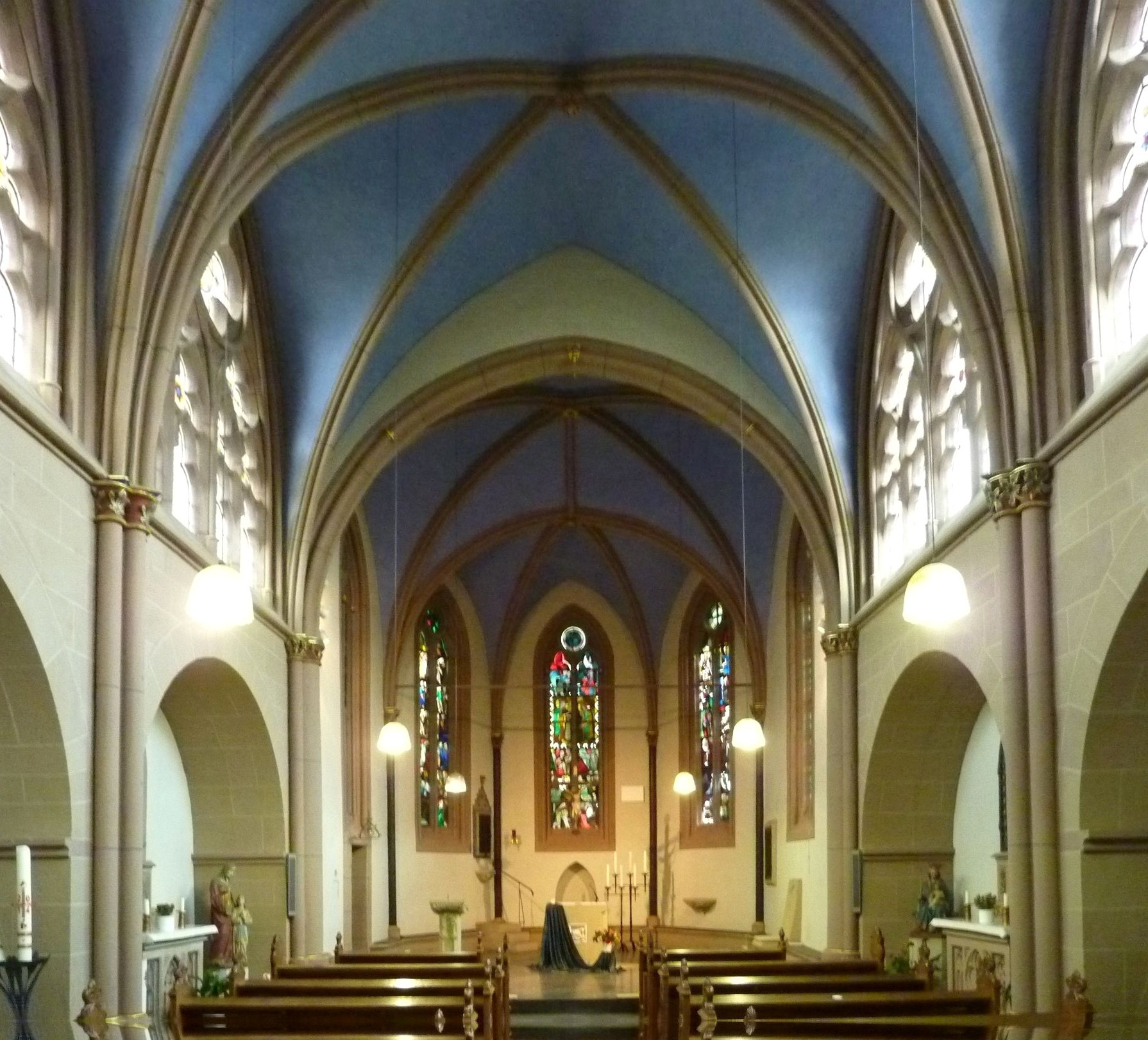 St. Mariä Heimsuchung (Frauwüllesheim)